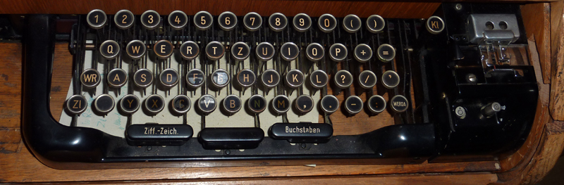 Tastatur eines Blattschreibers (Fernschreiber) von Siemens&Halske. Beschreibung der besonderen Tasten: WR = Wagenrücklauf, Zl = Zeilenschaltung, Ziff.-Zeich. = Ziffern-Zeichen (notwendig um Ziffern zu schreiben), Buchstaben (notwendig um Buchstaben zu schreiben), WERDA = Wer ist da?, Kl = Klingel